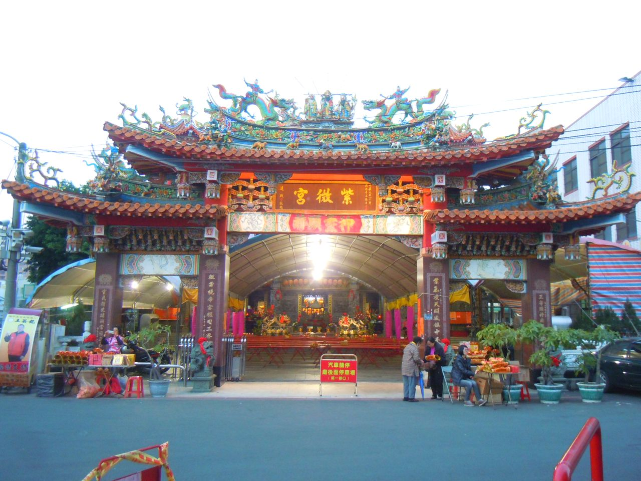 陳平庄紫微宮，位於臺中市北屯區中清路二段568號。